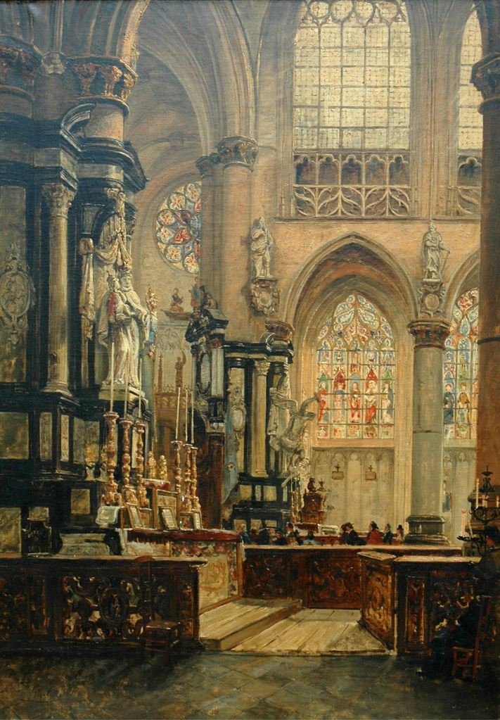 Gustave Walckiers, Eglise du Sablon